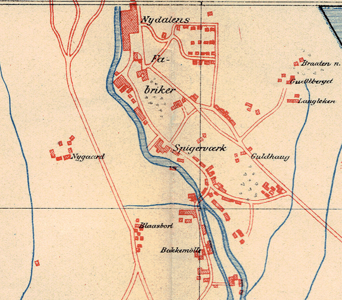 Nydalen, Oslo.